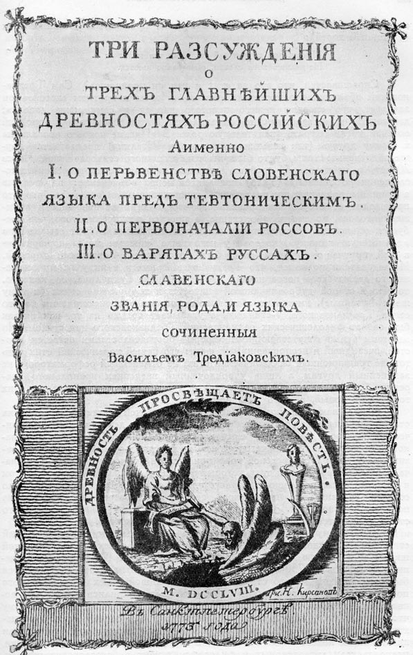 Титульный лист "Трёх рассуждений" Тредиаковского в переиздании 1773 года